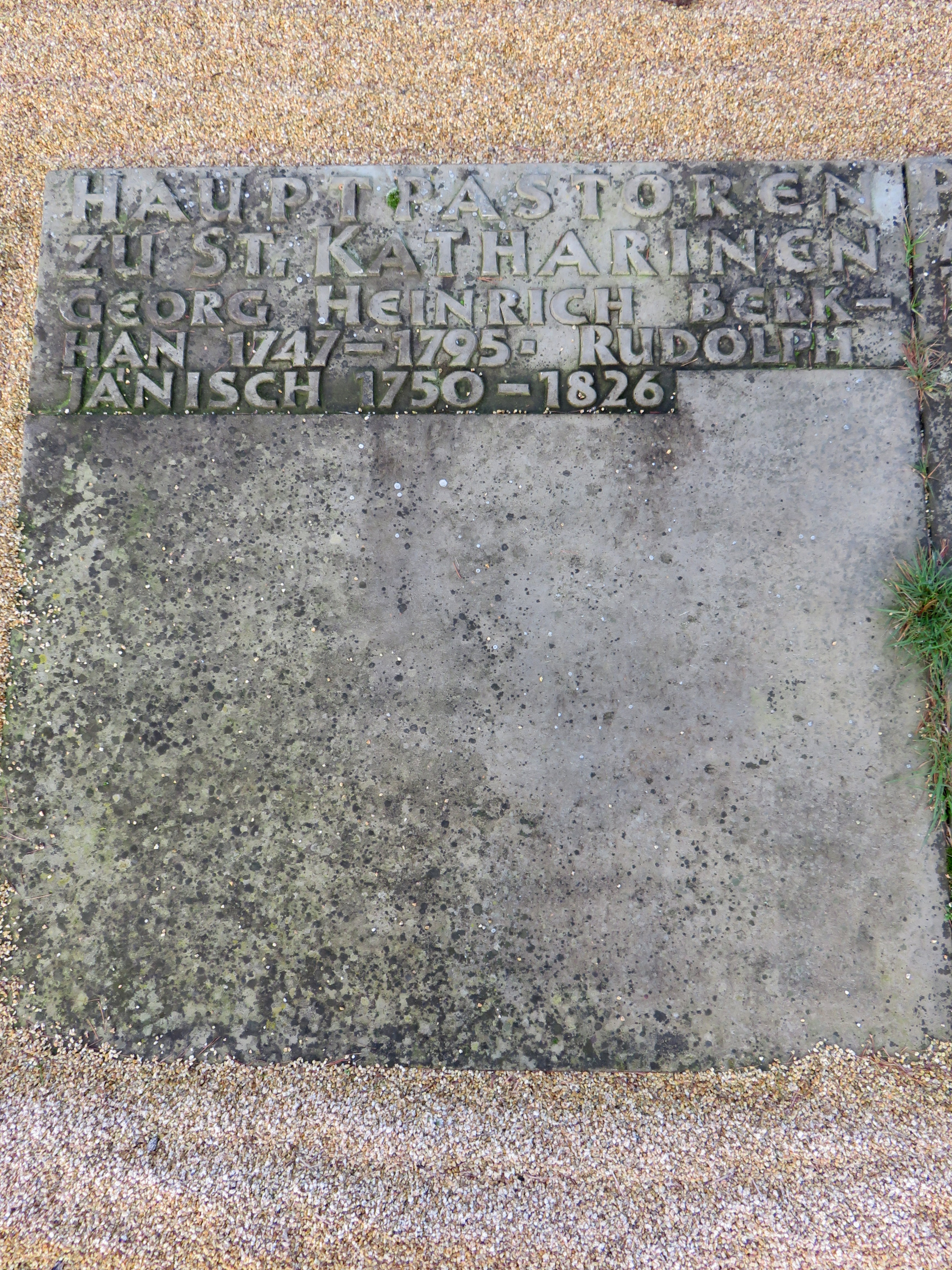 Doppelsammelgrab Hauptpastoren zu St. Katharinen / Pastoren zu St. Katharinen im Bereich des Althamburgischen Gedächtnisfriedhofs auf dem Hamburger Friedhof Ohlsdorf zu Ehren von unter anderen Georg Heinrich Berkhan.